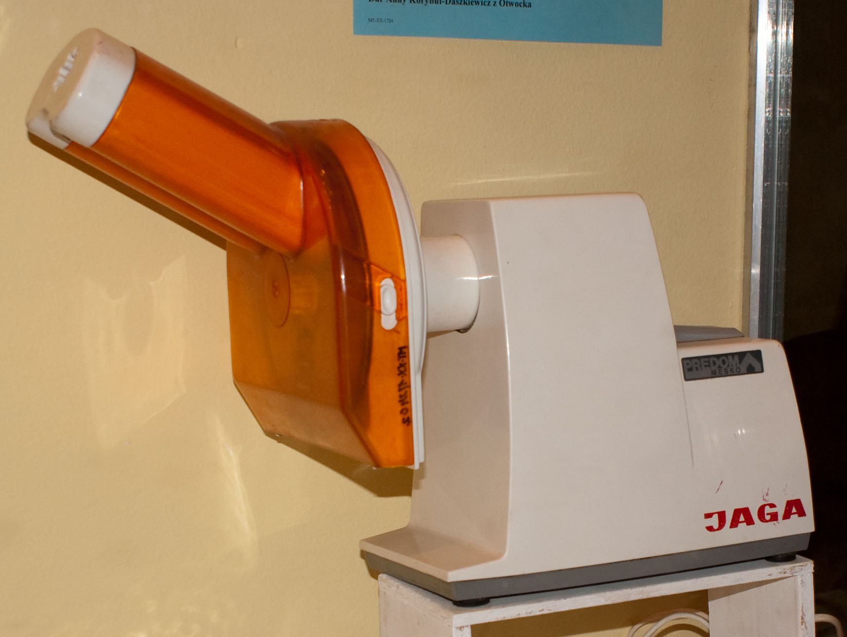 Wieloczynnościowa elektryczna maszynka kuchenna Jaga z połowy lat 70. XX w. produkowana przez Zakłady Metalowe Predom-Mesko, Skarżysko Kamienna.